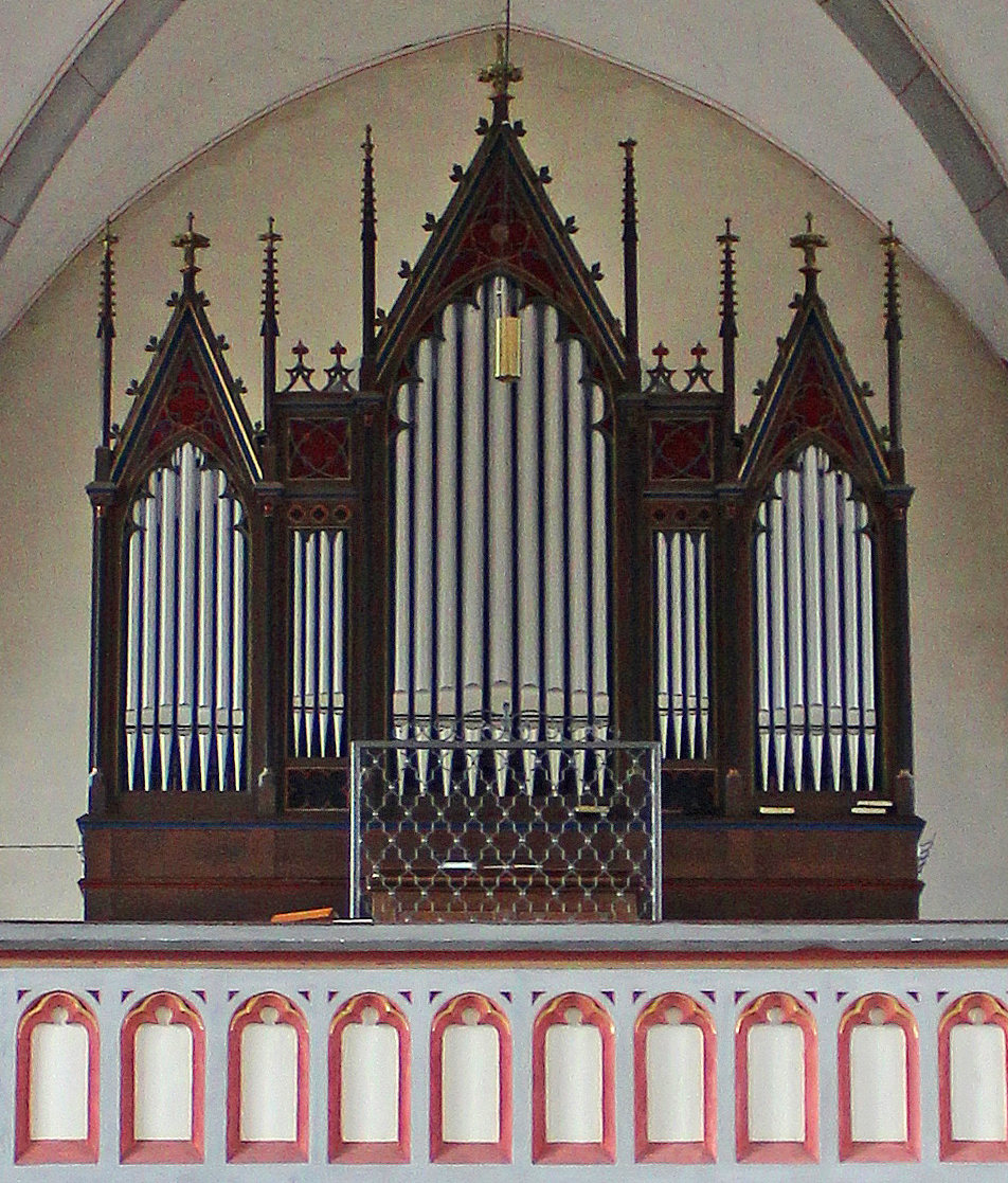 Orgelprospekt der katholischen Pfarrkirche St. Marien in Reisbach, einem Ortsteil der Gemeinde Saarwellingen, Landkreis Saarlouis, Saarland